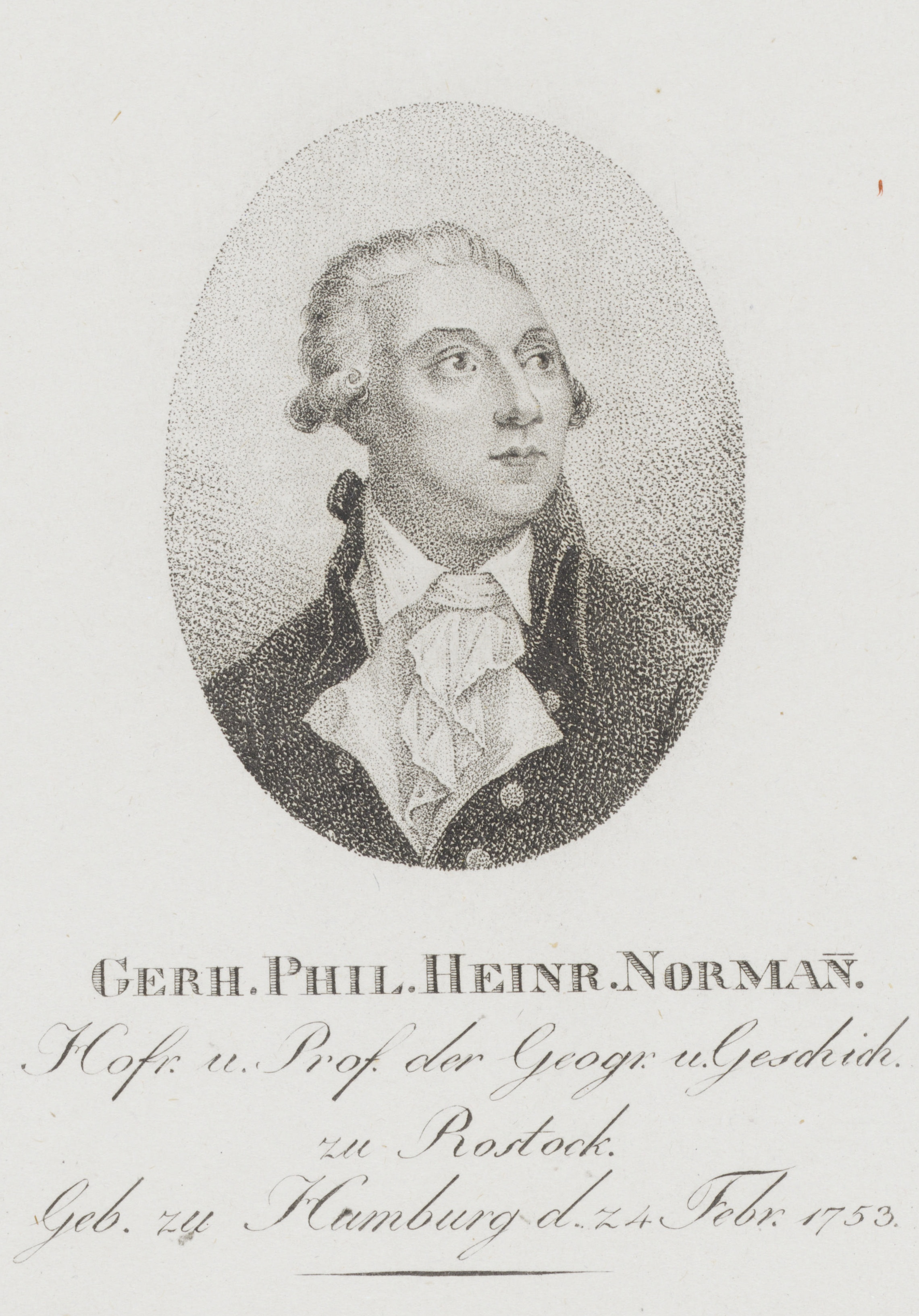 Gerh. Phil. Heinr. Norman.